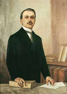 Retrato del historiador colombiano Gustavo Arboleda